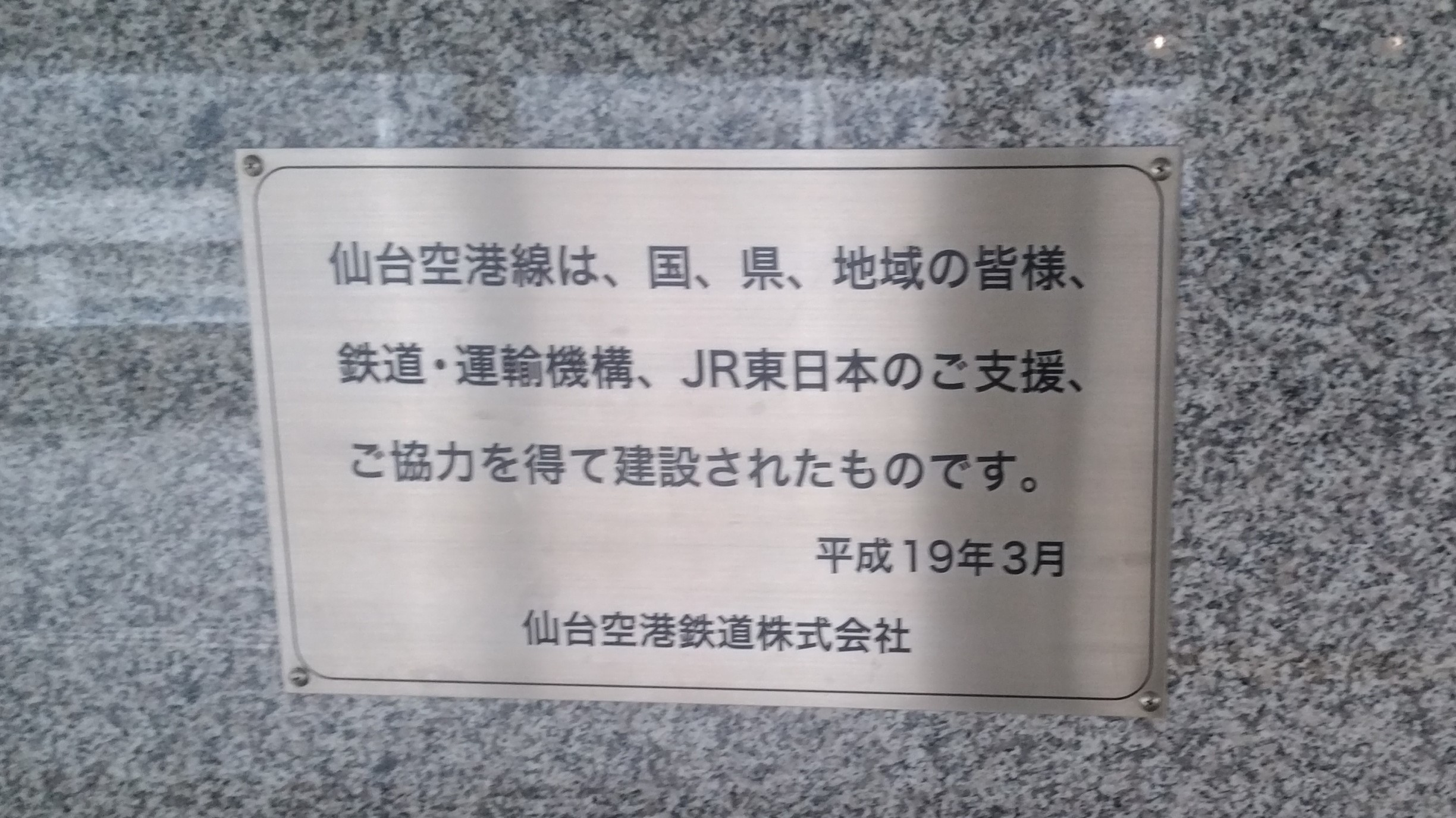 仙台空港駅に設置された仙台空港線の建設に関する銘板。